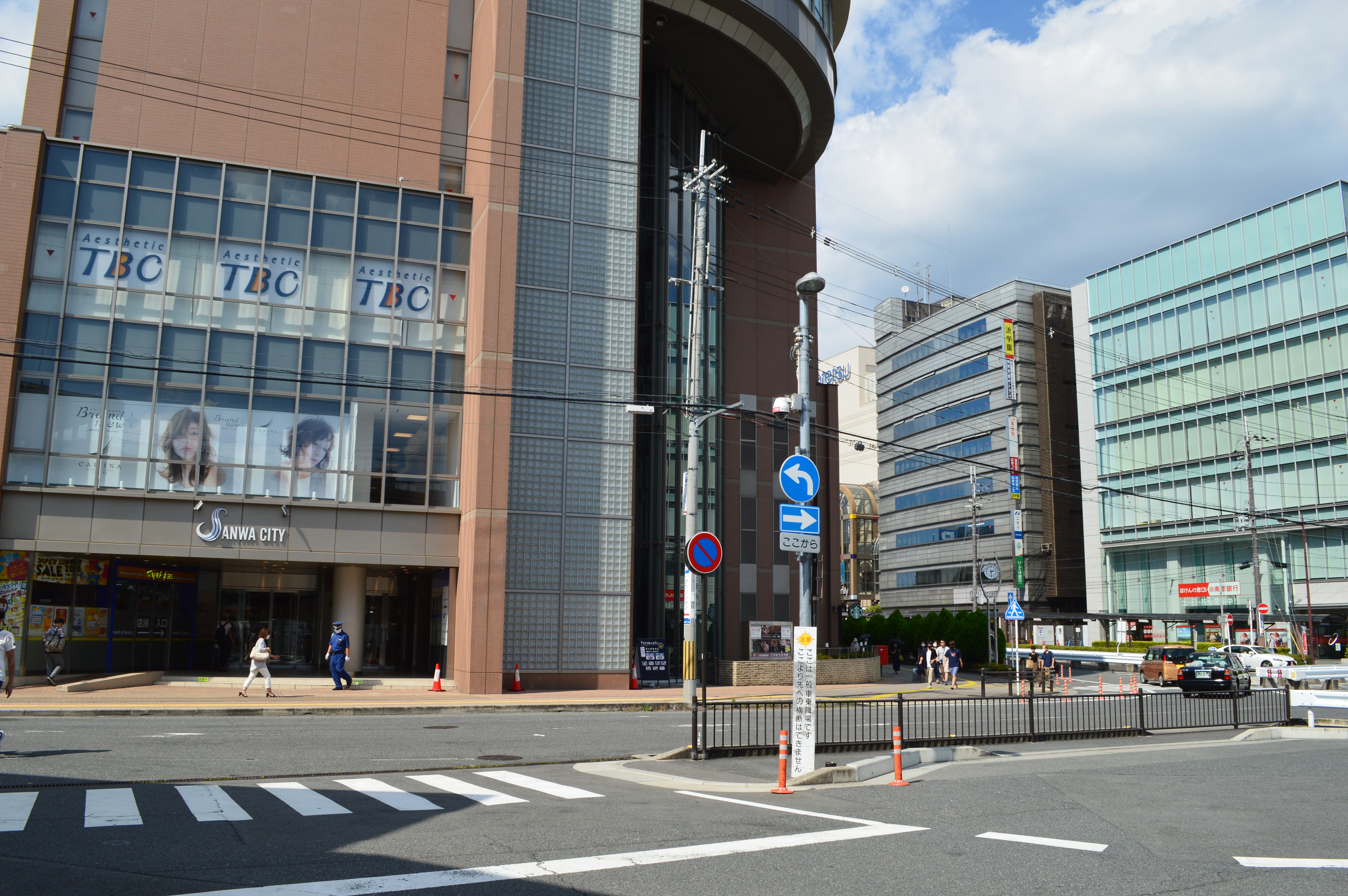 サンワシティ西大寺